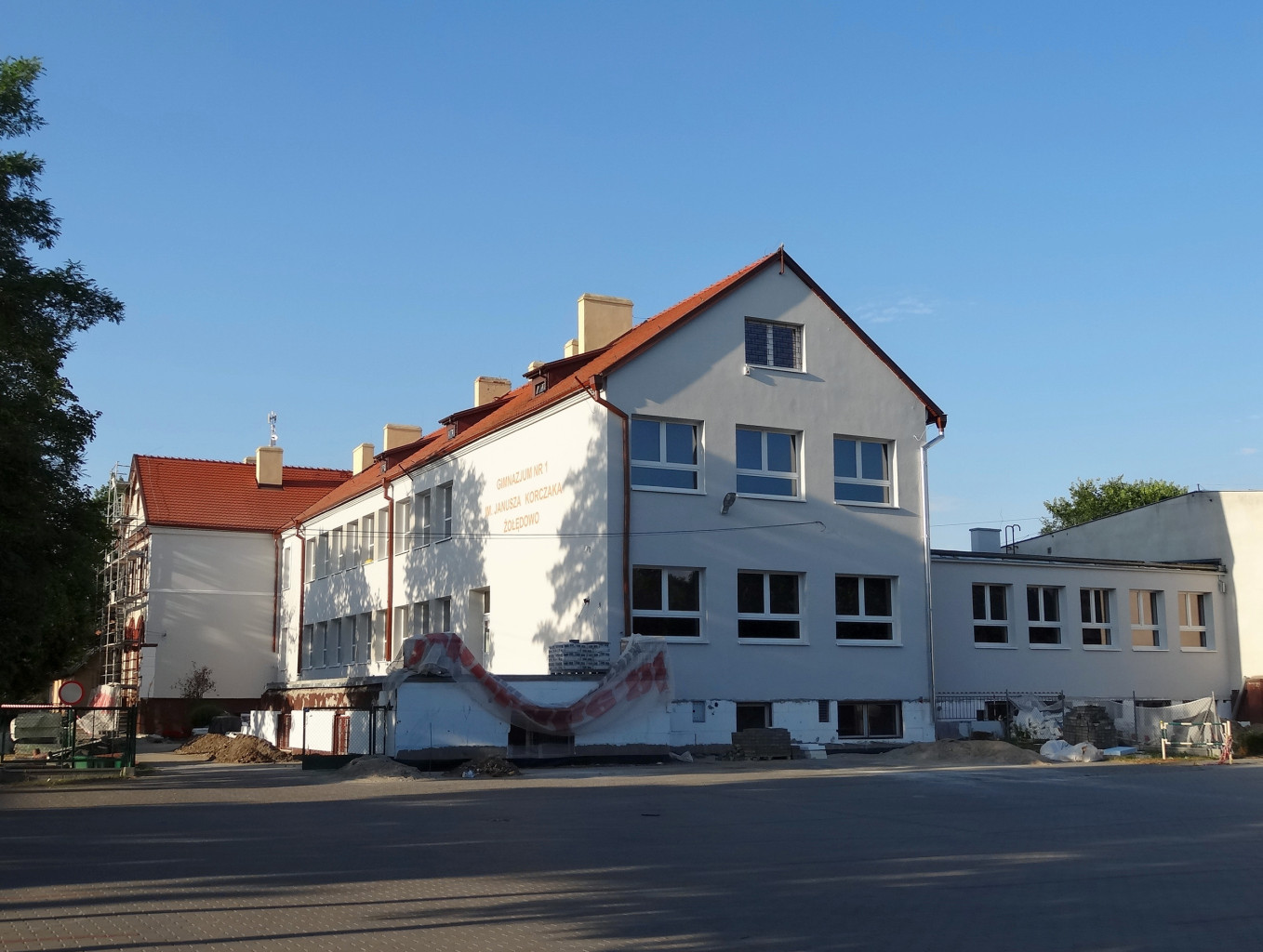 Gimnazjum im. Janusza Korczaka w Żołędowie, gmina Osielsko, powiat bydgoski